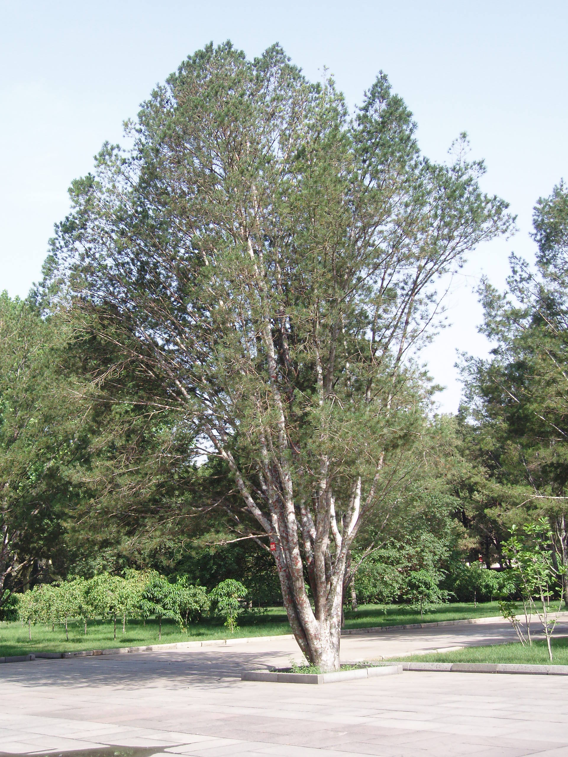 Lacebark pine